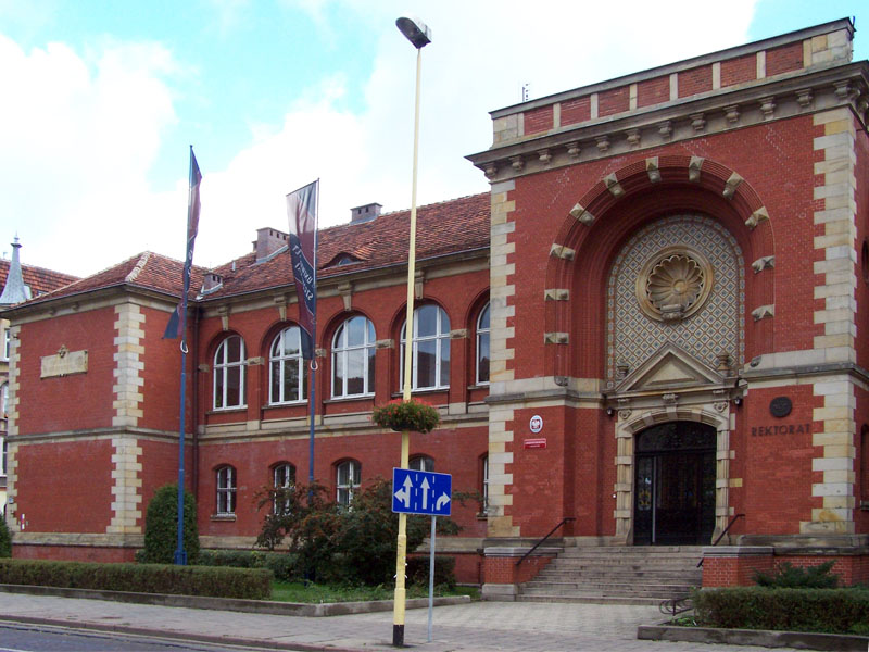 Budynek rektoratu Uniwersytetu Szczecińskiego